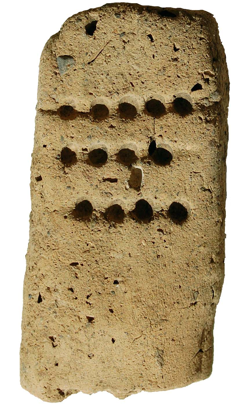 Tavoletta enigmatica rinvenuta presso il sito archeologico di "Sotciastel" e conservata presso il Museum Ladin Ćiastel de Tor